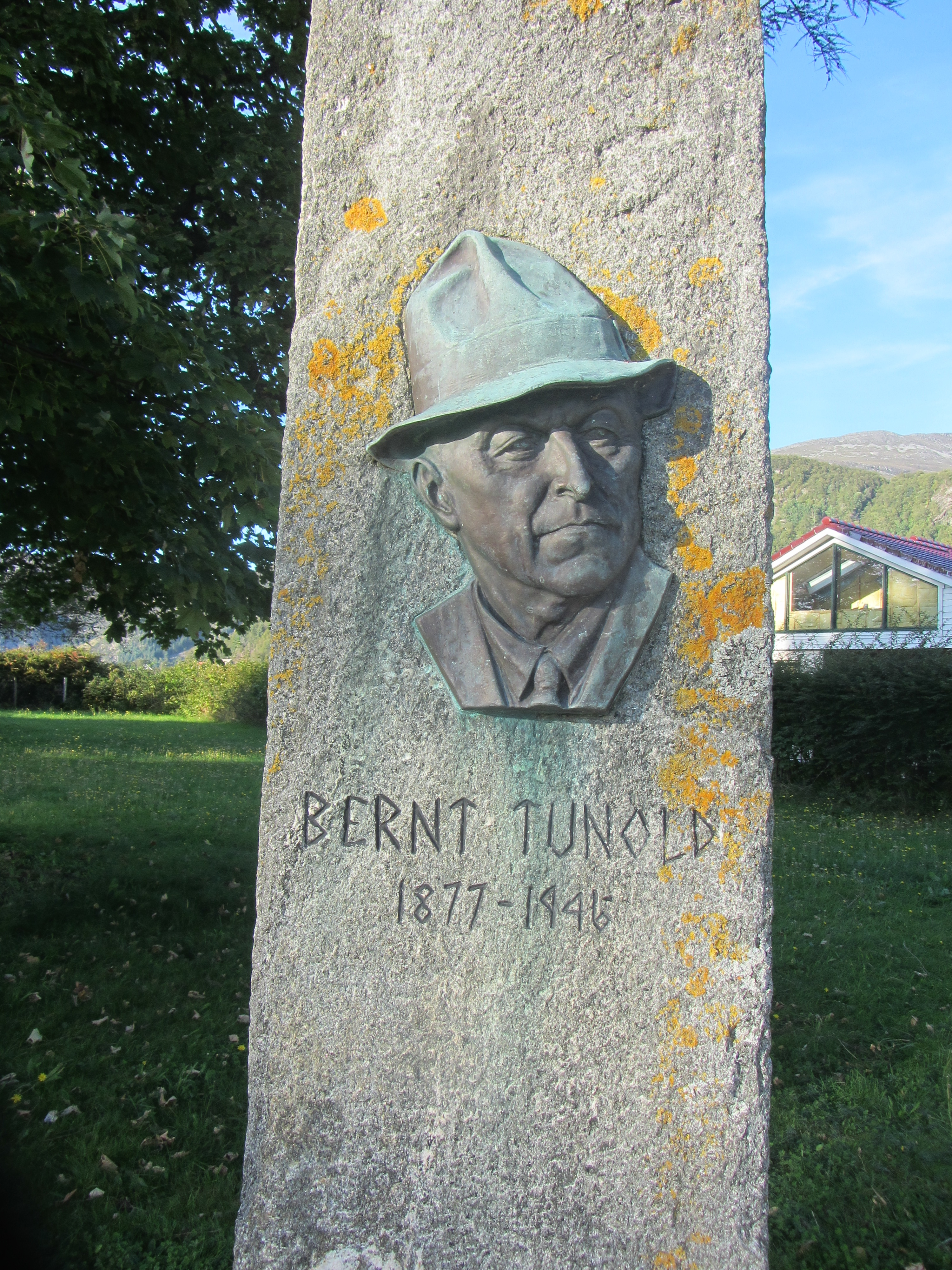 Bauta over kunstmaler Bernt Tunold i parken i Selje i Sogn og Fjordane